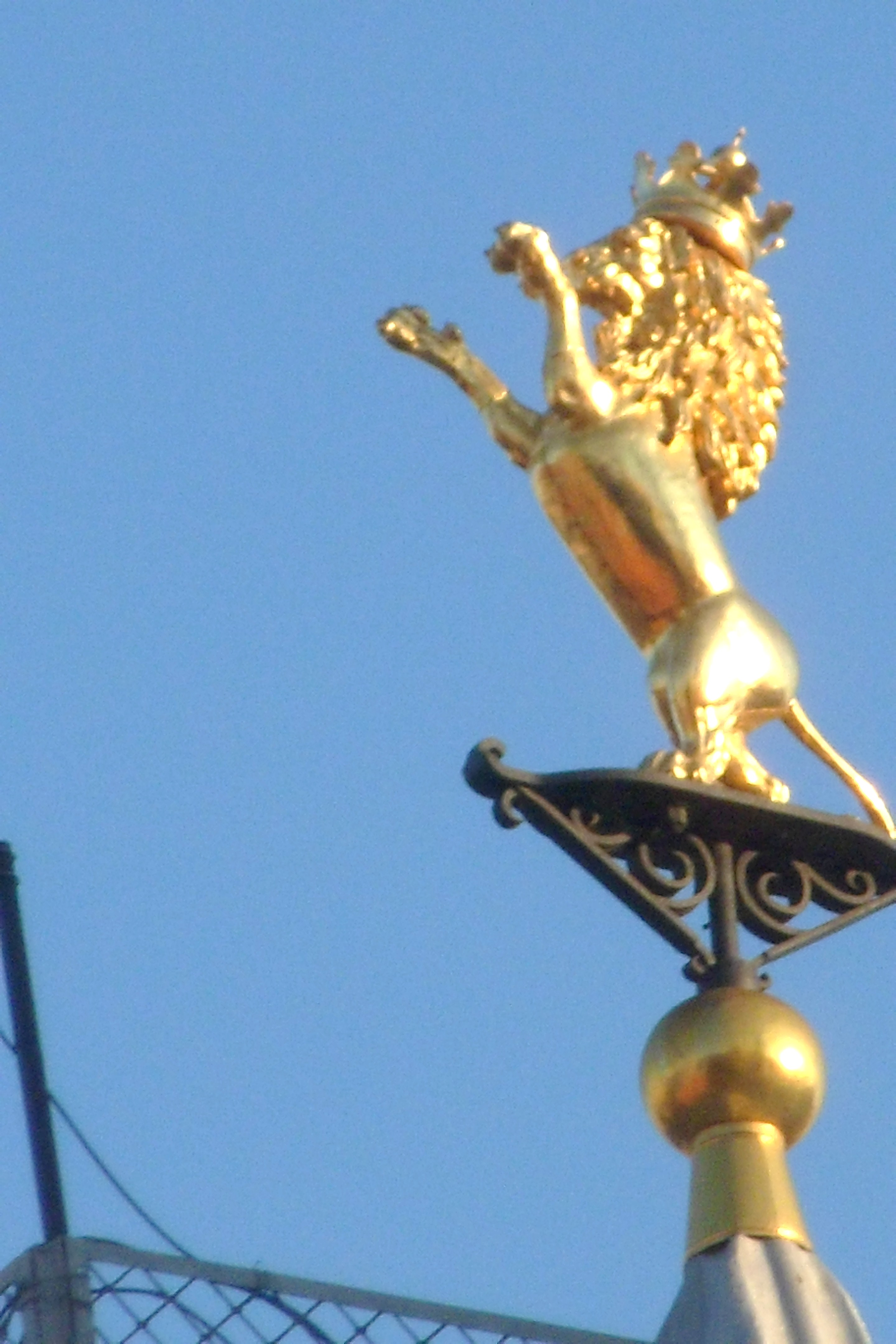 Лев на крыше Государственного Исторического музея в Москве